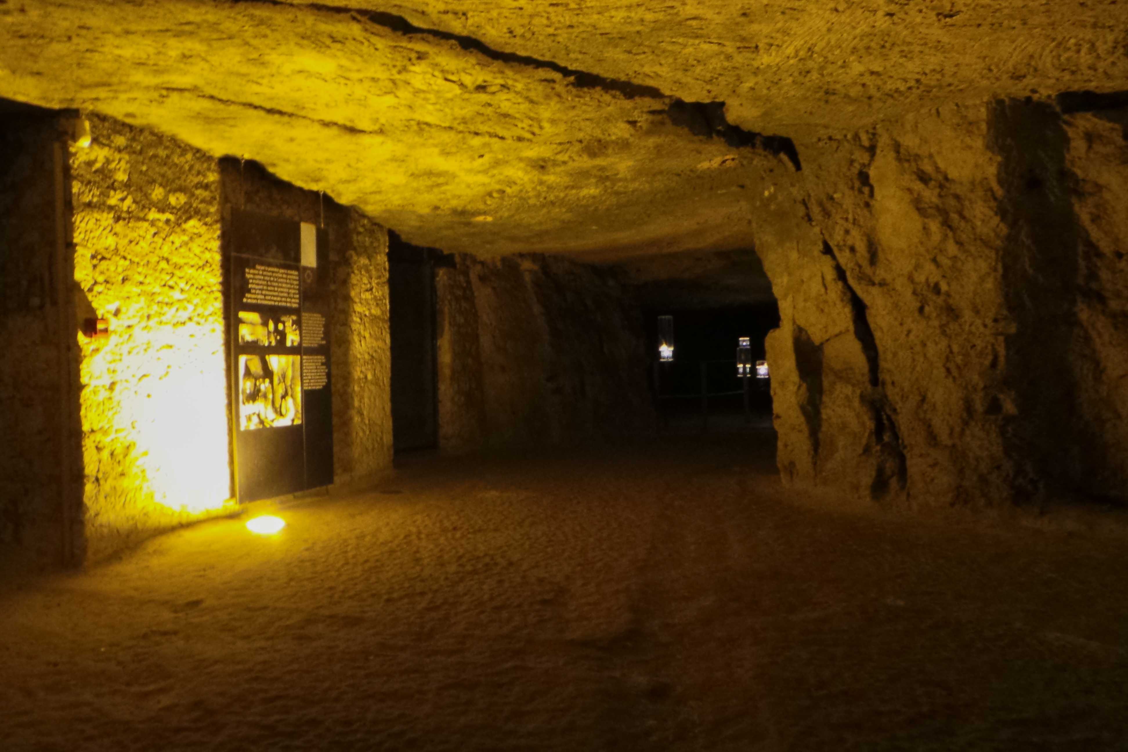 La caverne du Dragon, Chemin des Dames, commune d'Oulches-la-Vallée-Foulon, Aisnes, France